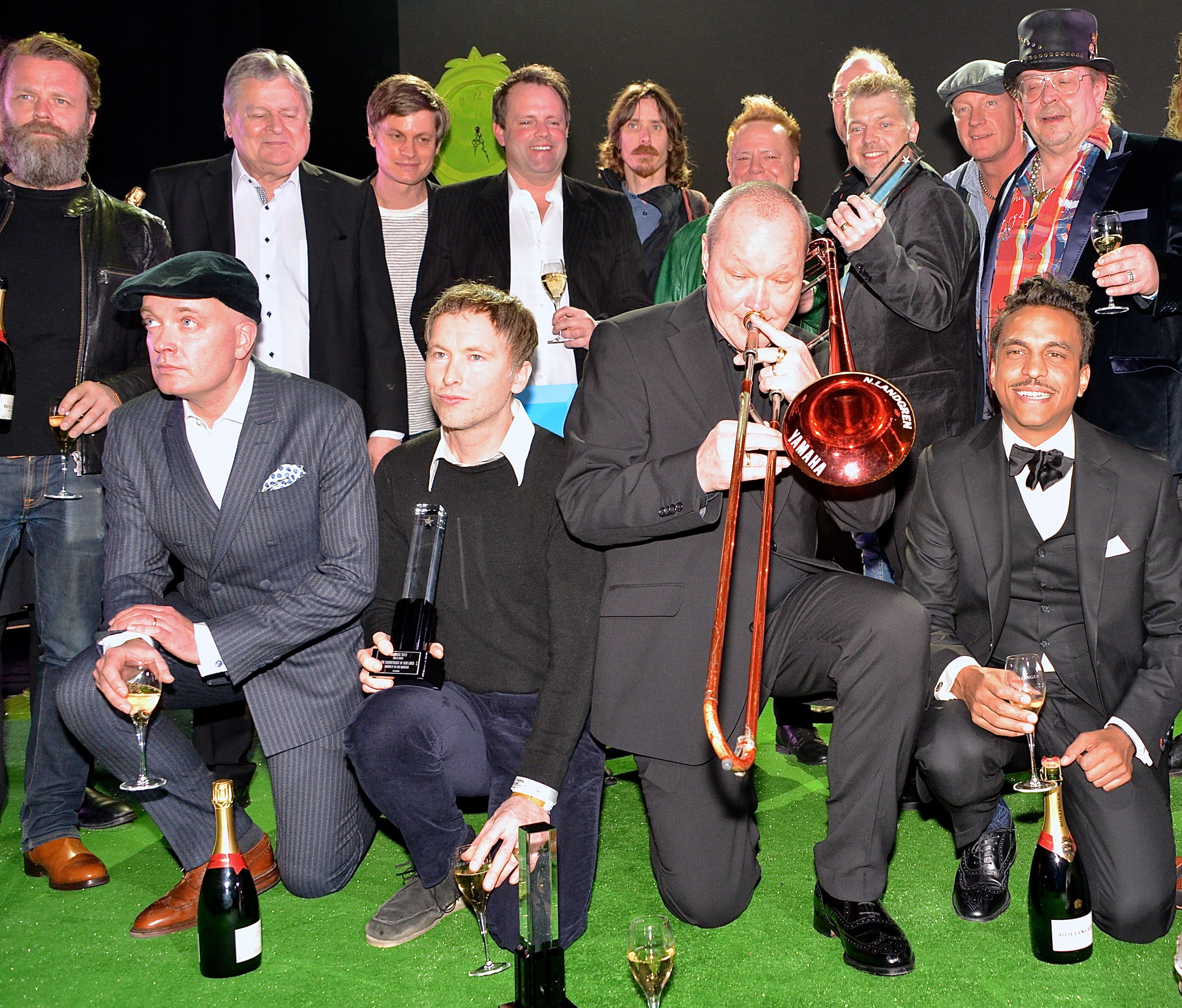 Några Grammisvinnare på Grammisgalan på Cirkus, Stockholm den 20 februari 2013.